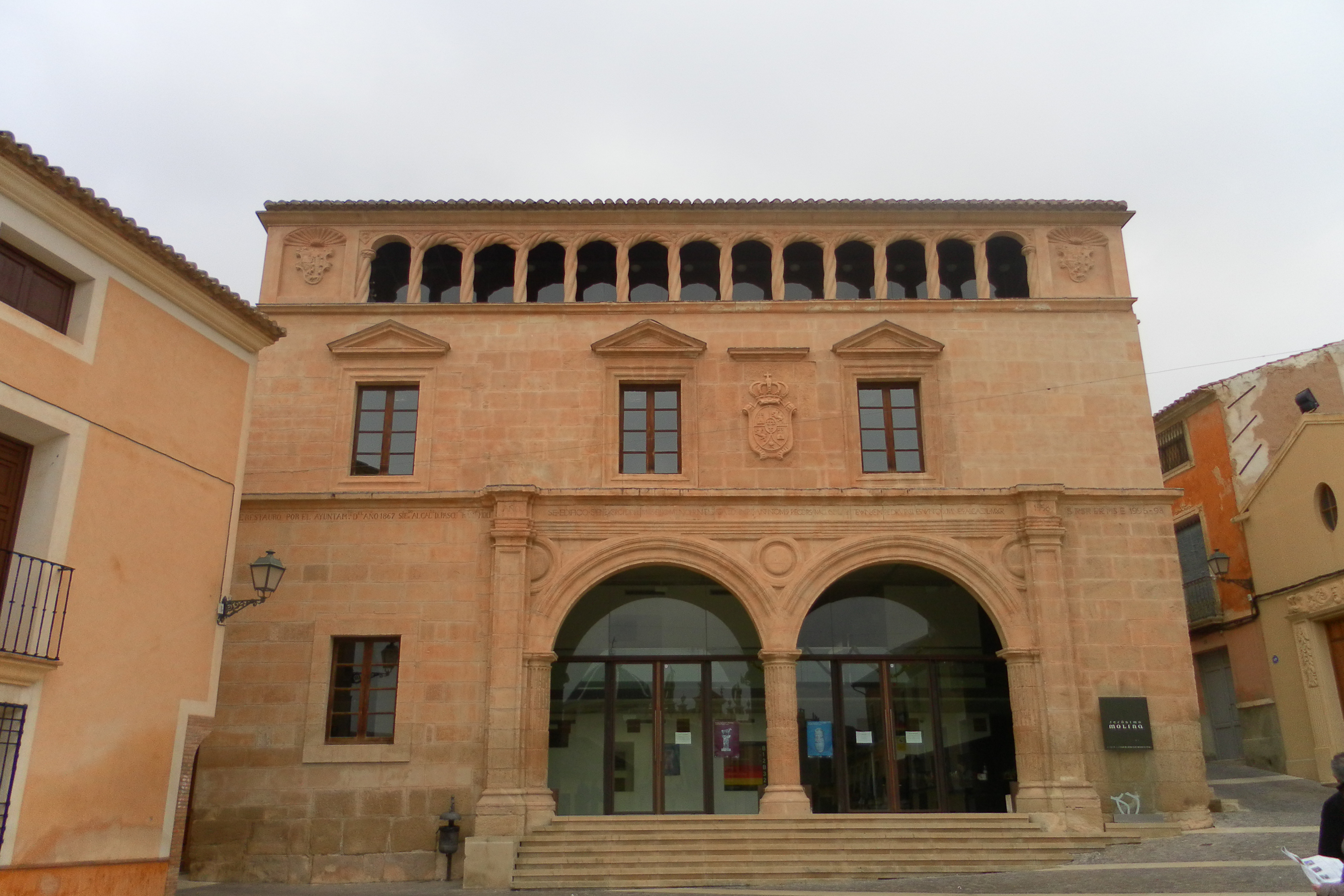 Palacio del Concejo de Jumilla (Región de Murcia, España). Edificado en el siglo XVI.